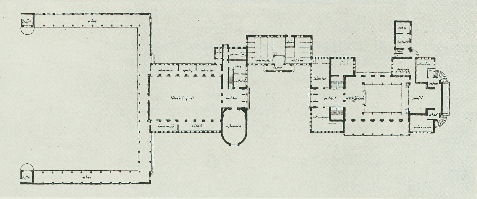 Otakar Novotný: Sokolovna v Holicích, II. projekt z let 1910-1011, realizována pouze levá část.